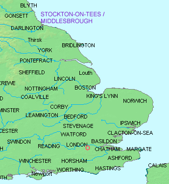 Kartenausschnitt Nordengland /Stockton /Middlesbrough